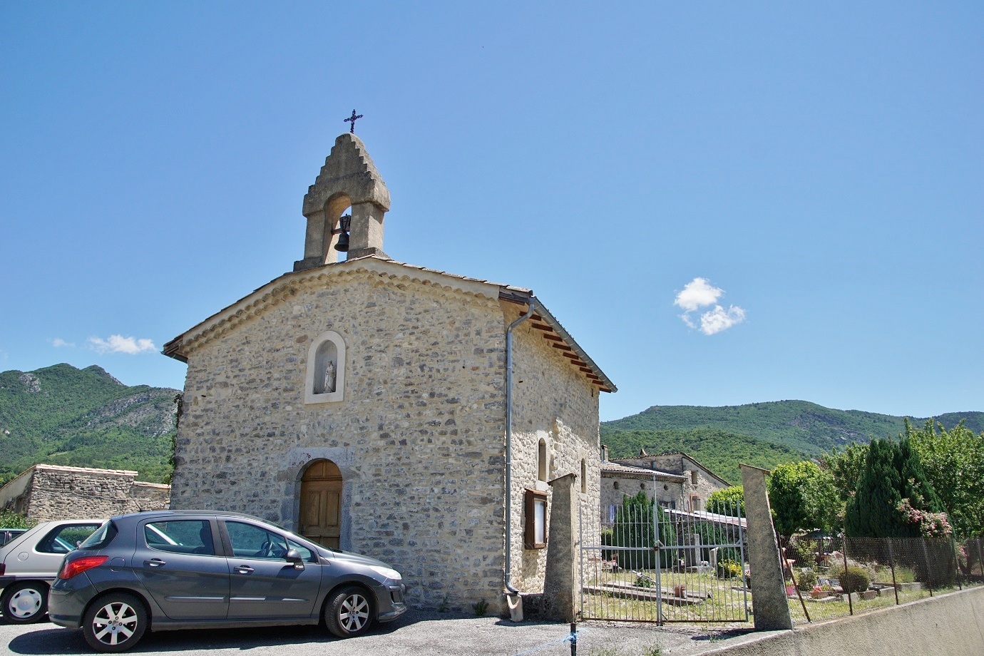 département de la Drôme